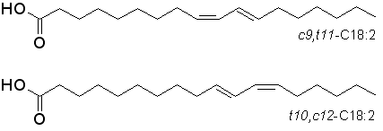 Twee meestvoorkomende CLA isomeren: cis-9, trans-11 CLA en trans-10, cis-12 CLA